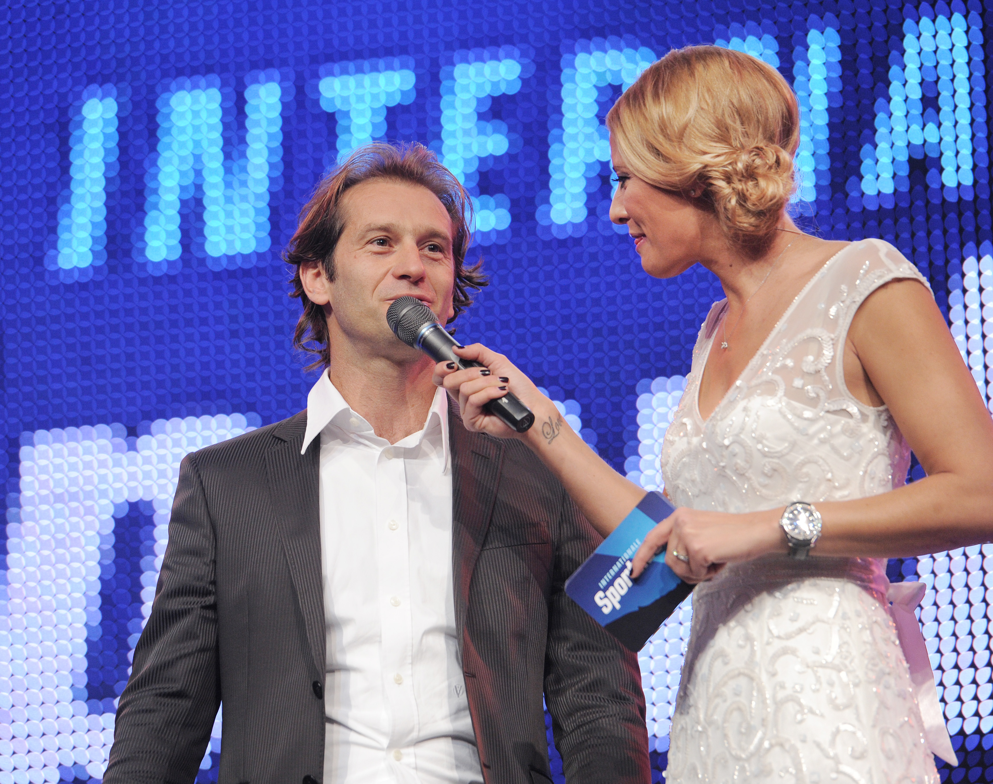 Davos, 03.10.2014. Sport, 12. Internationale Sportnacht Davos 2014. Christa Rigozzi befragt den ehemaligen Formel-1-Piloten Jarno Trulli.. Copyright by: foto-net / Kurt Schorrer